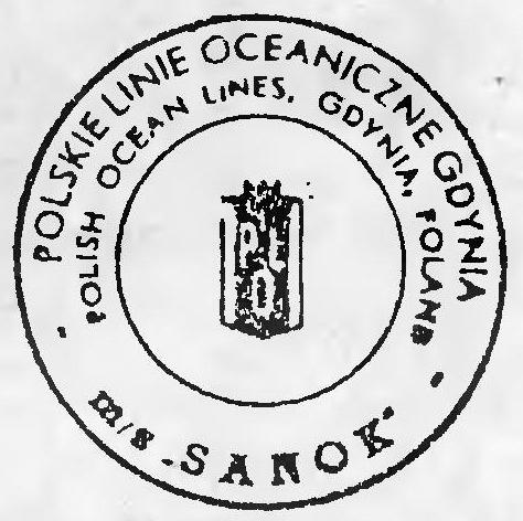 Logo statku MS Sanok